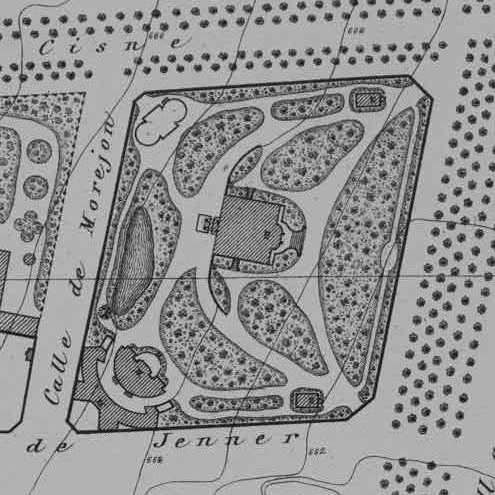 El Palacio de Indo y el Barrio de Indo en el Plano Parcelario de Madrid de 1874, realizado por el Instituto Geográfico y dirigido por Carlos Ibáñez e Ibáñez de Ibero